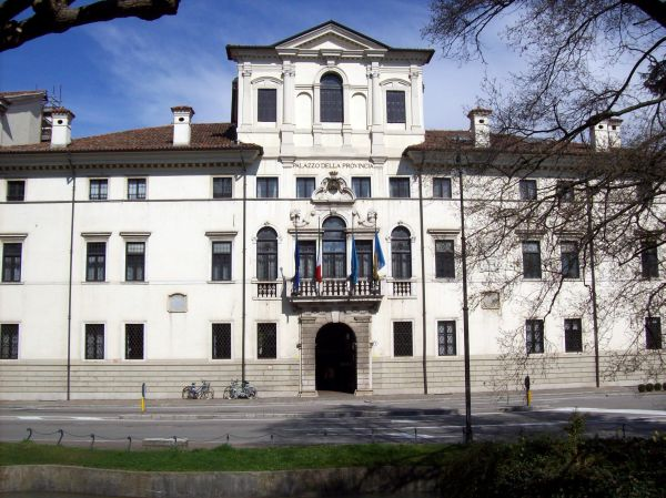 Udine-Palazzo Antonini Belgrado sede della Provincia